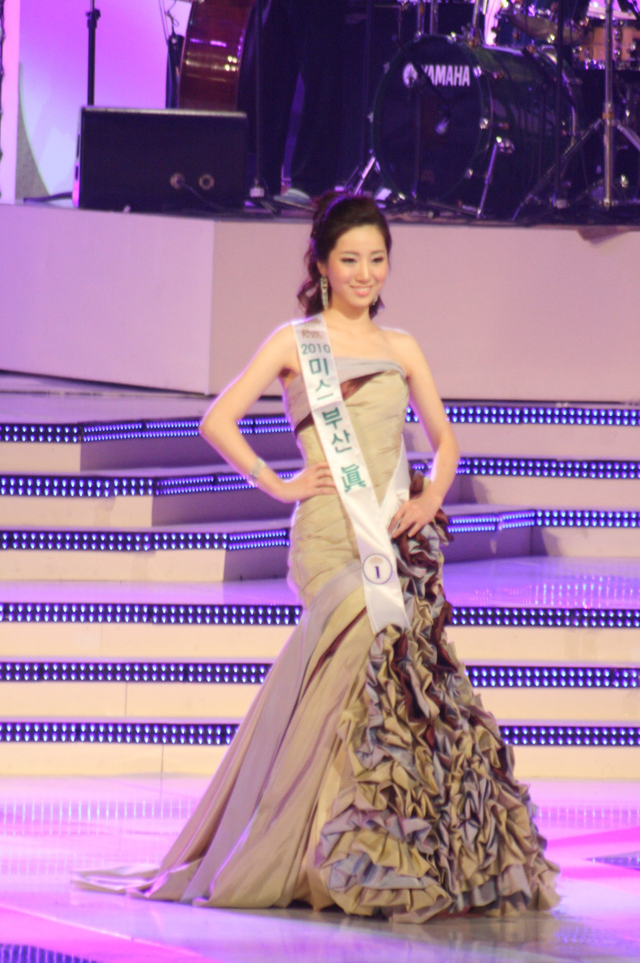 2010 미스코리아 미 고현영(부산 진) 드레스 심사